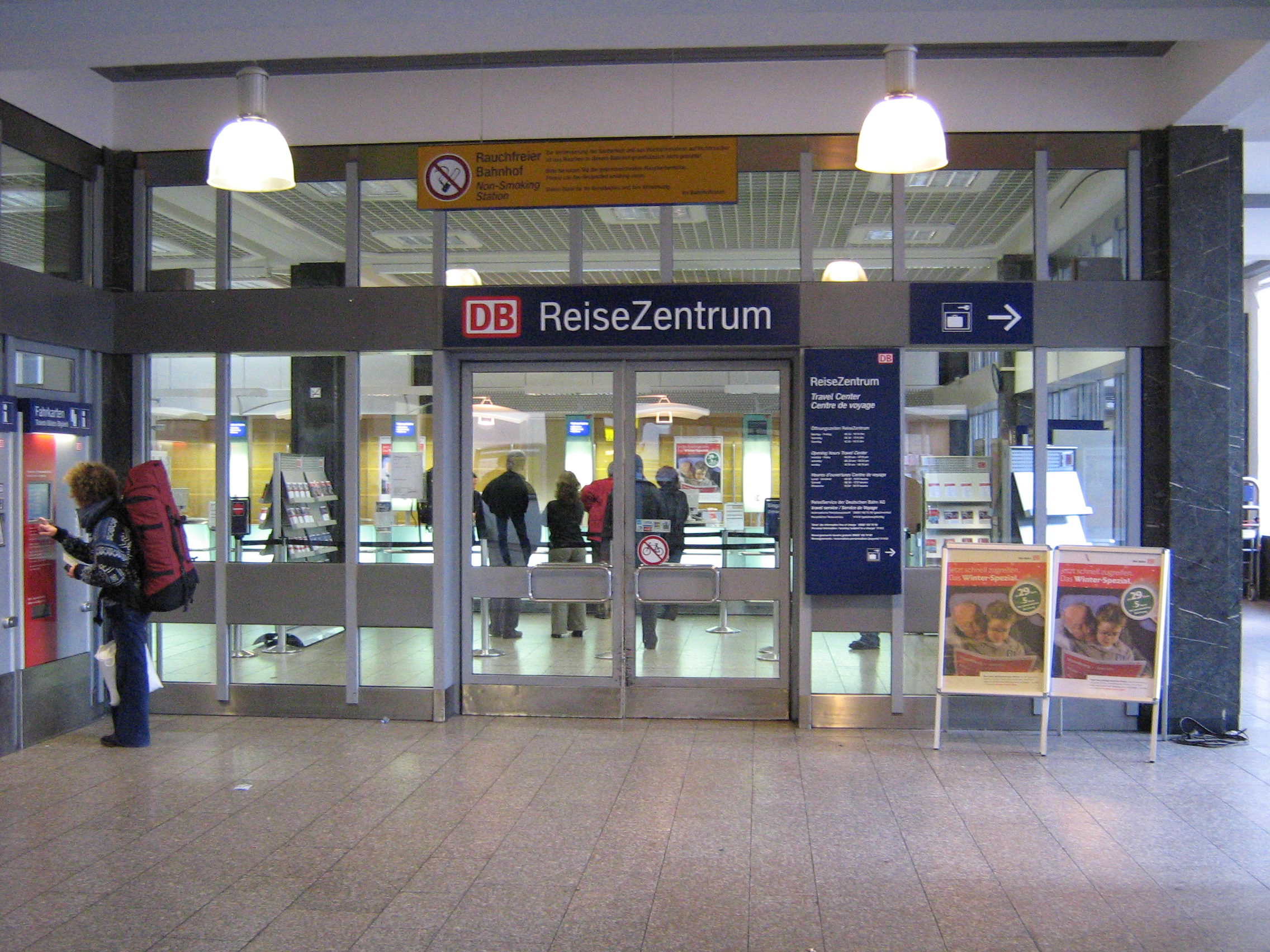 DB Reisezentrum at Trier station